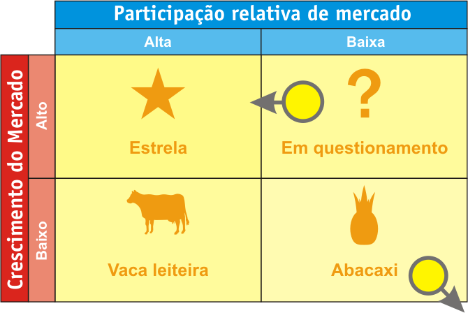 Matriz BCG, do Boston Consulting Group. Filtros de agua